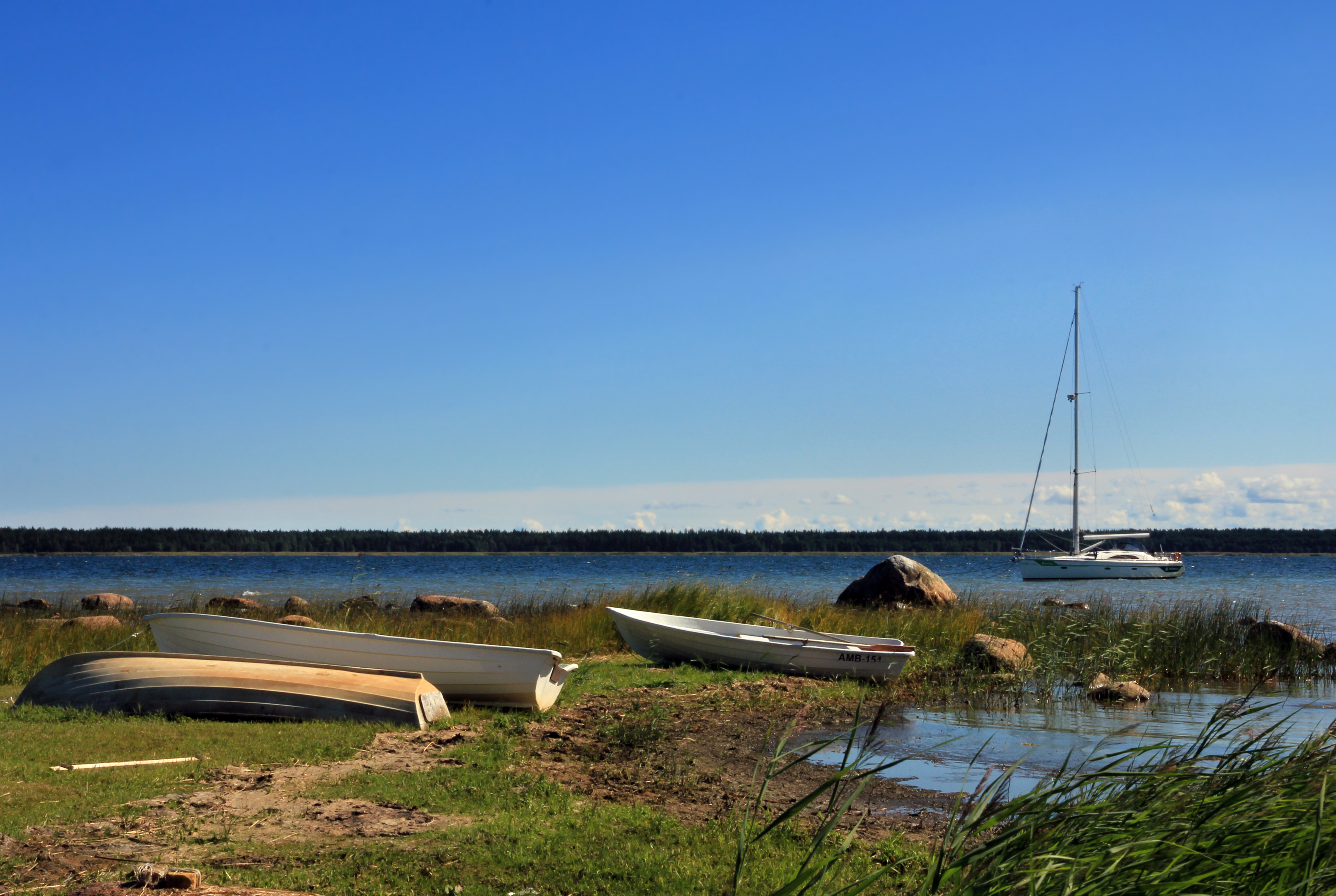 Käsmu kaldapalne paatidega